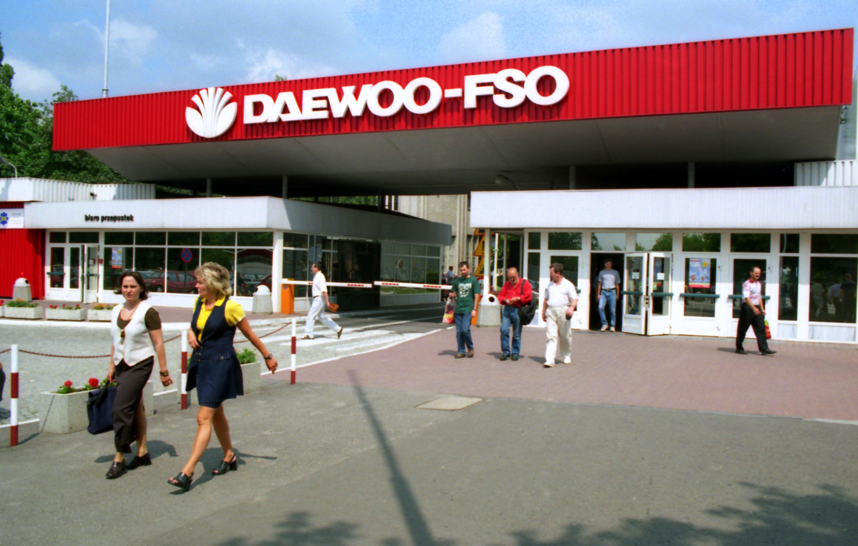 Główna brama do fabryki Daewoo-FSO na warszawskim Żeraniu.